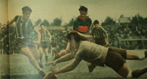 Partido del 26 de septiembre de 1948, Rosario Central 4-Tigre 2. El arquero Rubén Villafañe (Tigre) neutraliza un ataque de Luis Bravo (Rosario Central).